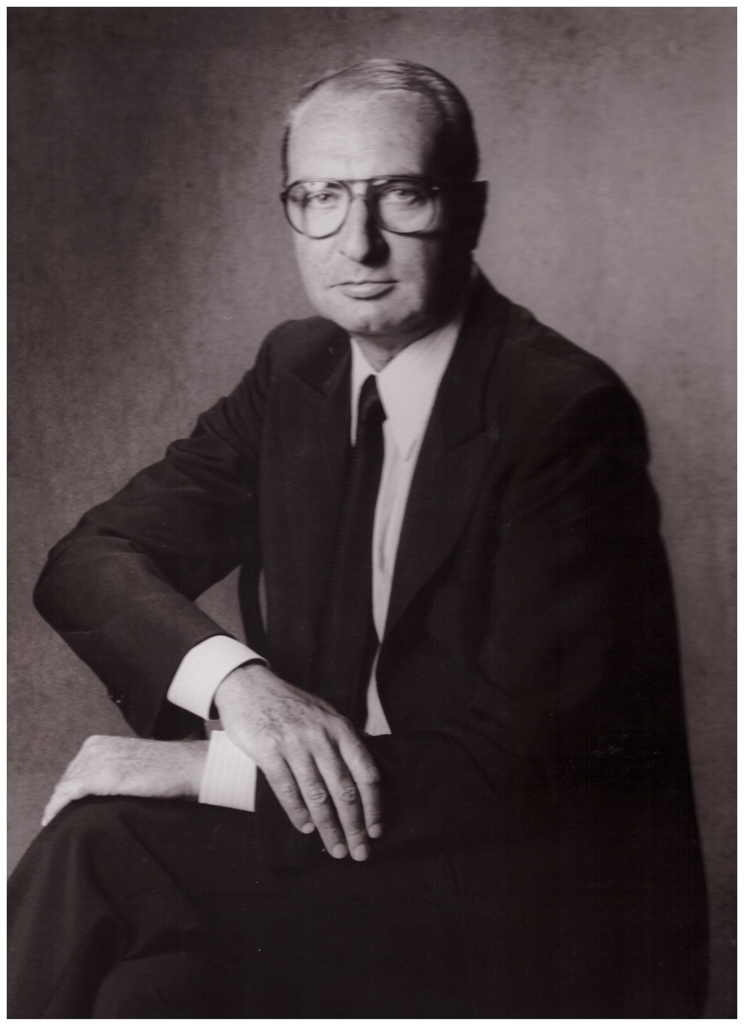 André Laug negli anni Ottanta